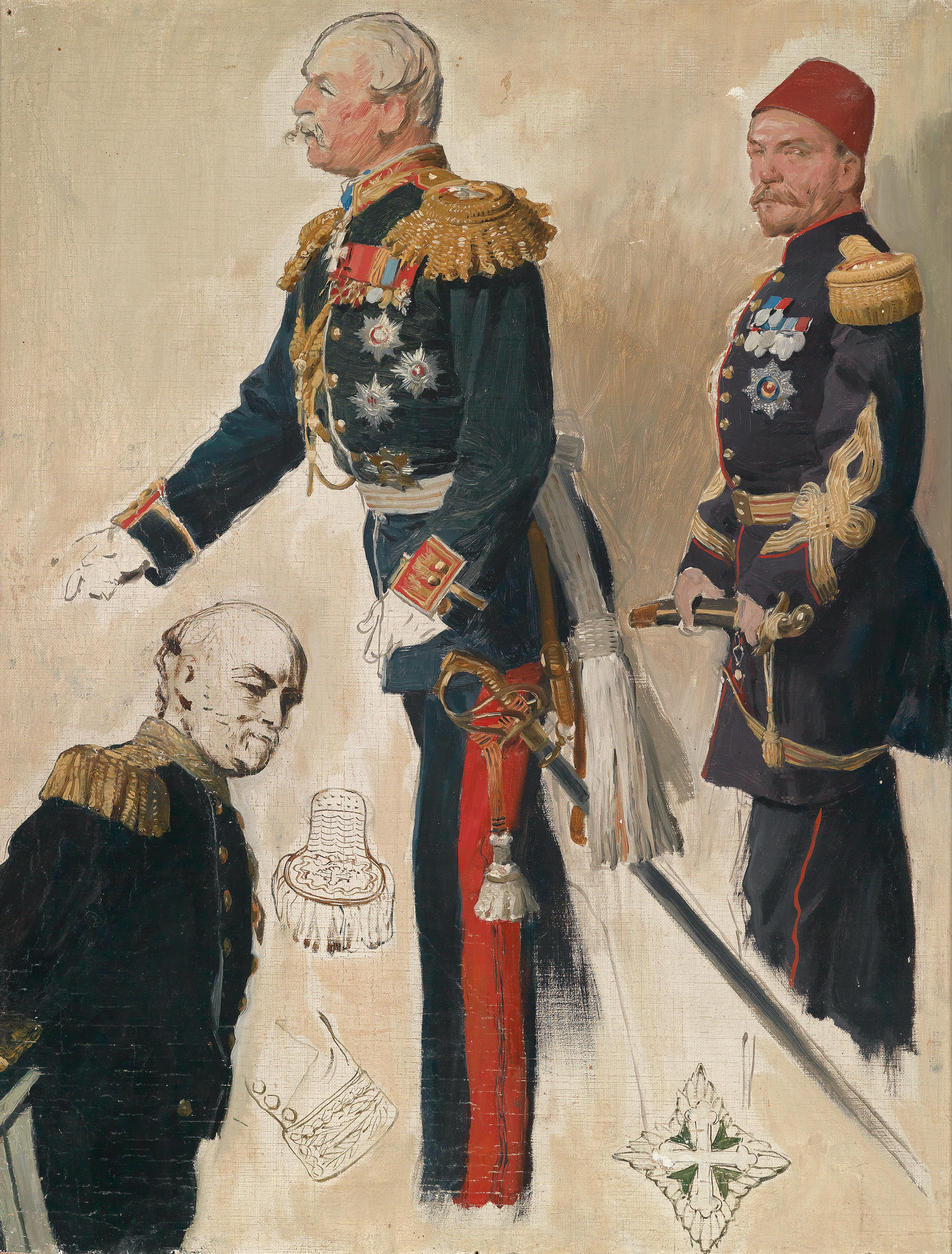 Berliner Kongress (1878), Ölskizze, darstellend den Russischen Gesandten Pjotr Andrejewitsch Schuwalow, den Deutschen Reichskanzler Otto Fürst von Bismarck und das Mitglied der Osmanischen Delegation General Mehmed Ali Pascha, dazu Studien zu Uniformeffekten und Orden, Öl auf Leinwand auf Karton, 62 x 47 cm